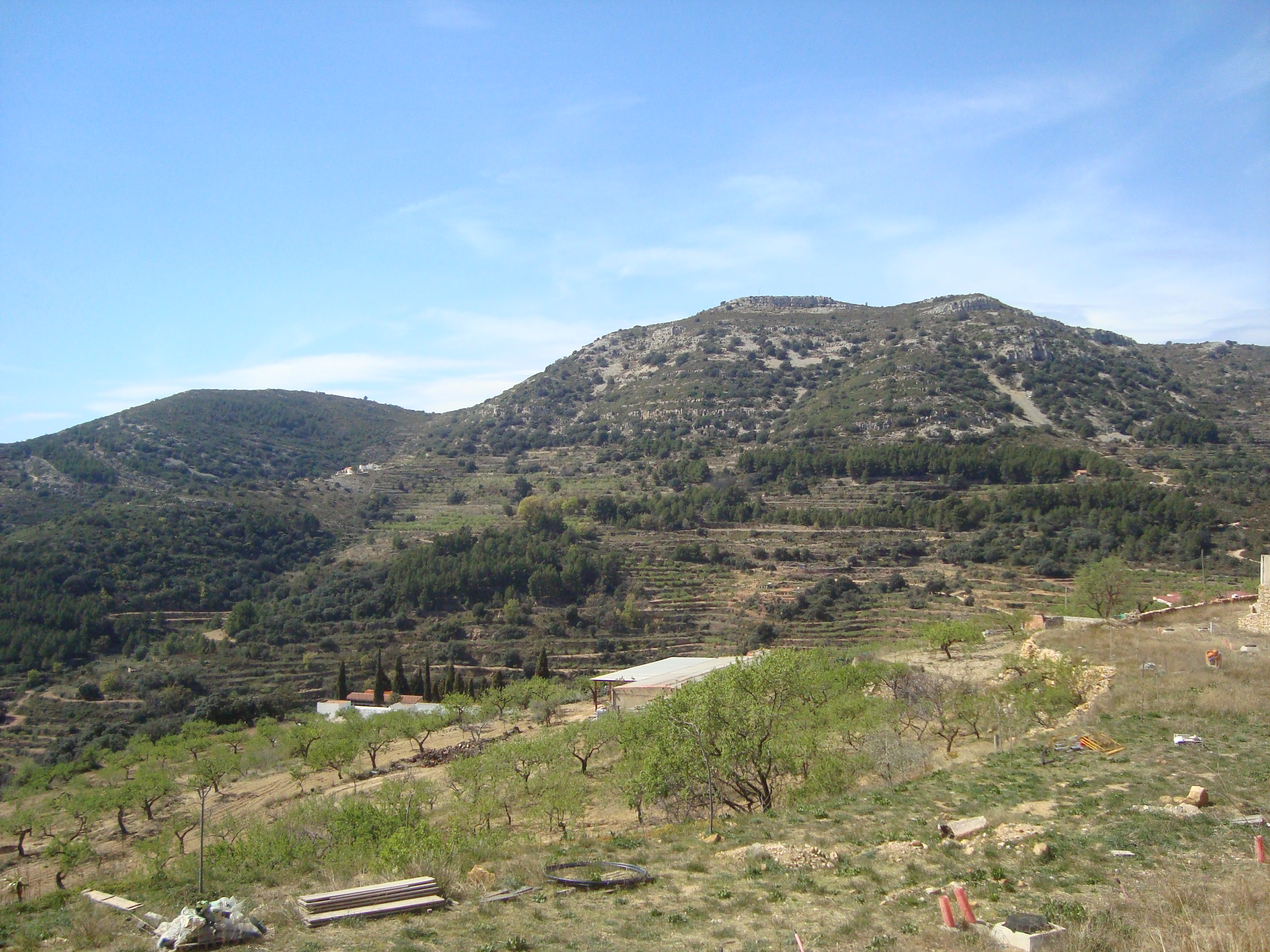 Tossal de la Vila (la Serra d'en Galceran) 05.105-006.